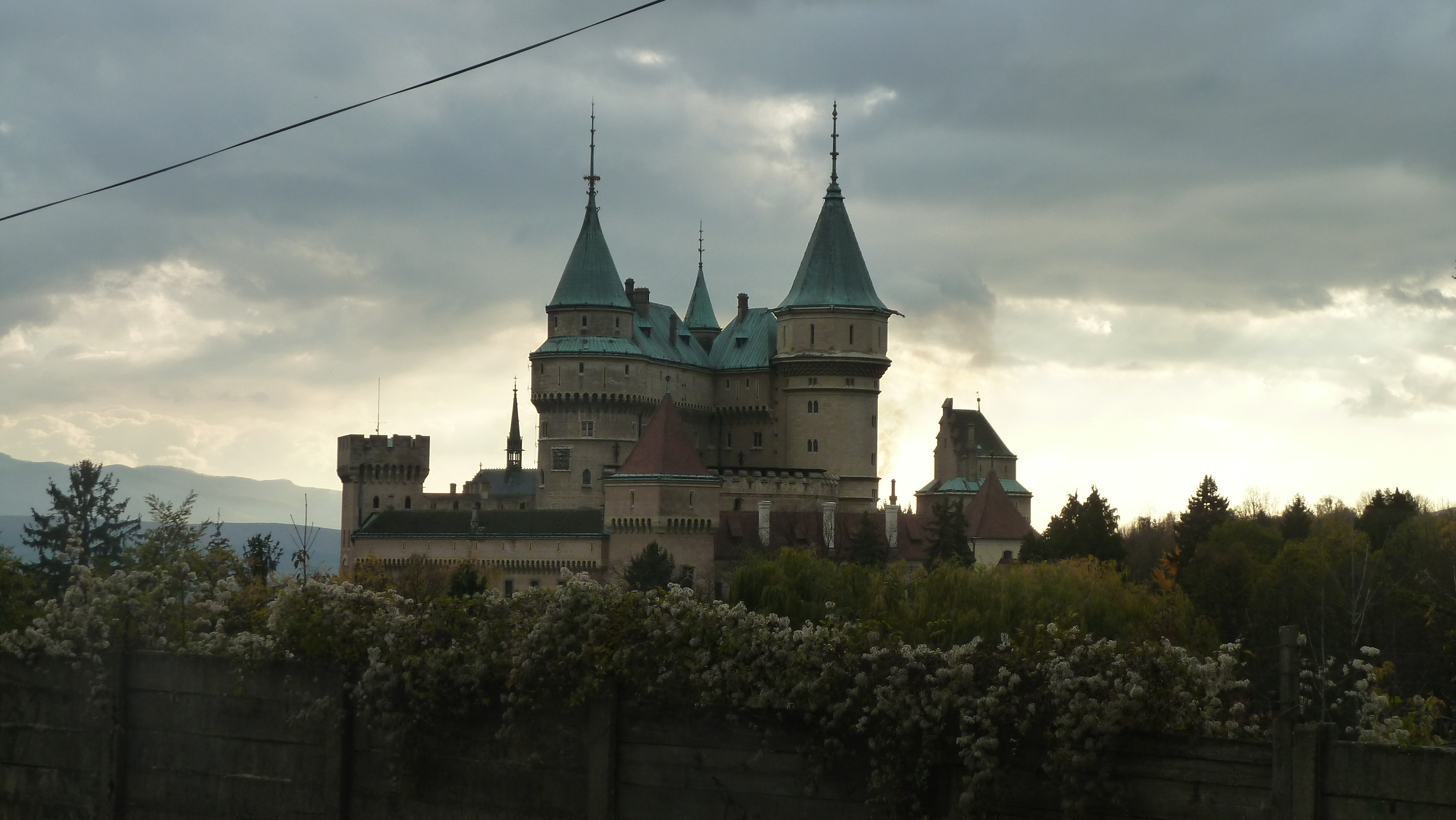 Bojnický zámok od nákladnej brány Zoo Bojnice